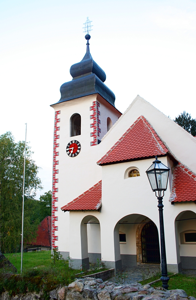 Kapela Sv. Mihovila. Ogranak Matice Hrvatske Samobor u ovoj kapelici od 1991. godine svake godine na dan Sv. Mihovila održava susrete samoborskih pjesnika "Pri Svetem Mihalu".